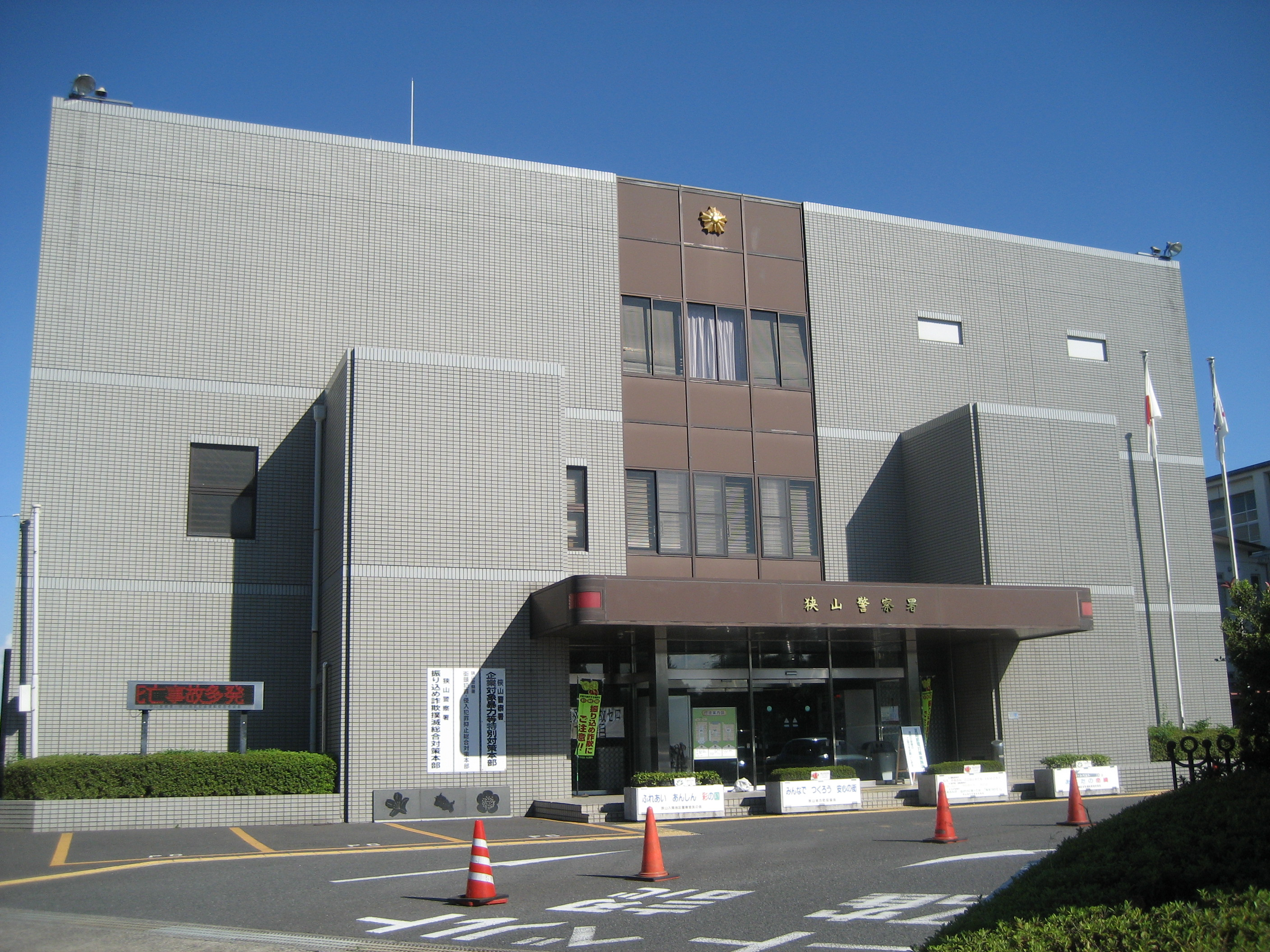 埼玉県狭山警察署庁舎